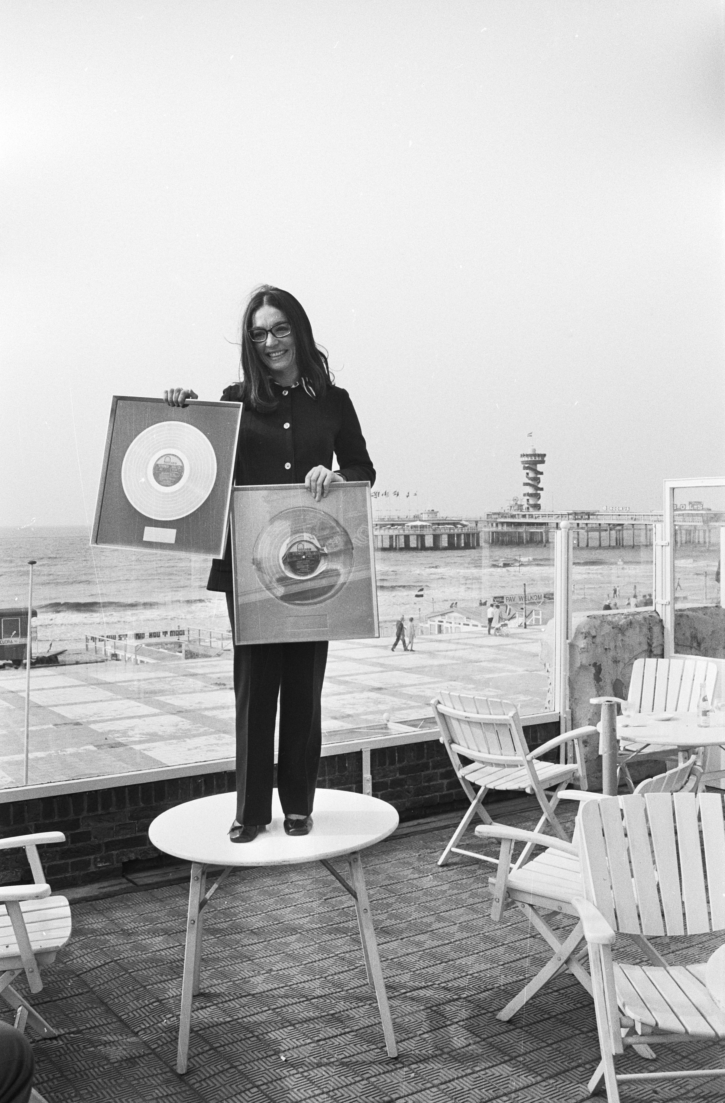 Collectie / Archief : Fotocollectie Anefo Reportage / Serie : Nana Mouskouri krijgt een gouden en een platina plaat in het Kurhaus te Beschrijving : Nana Mouskouri toont haar platen op het terras Datum : 13 mei 1971 Locatie : Scheveningen, Zuid-Holland Trefwoorden : terrassen, zangers Persoonsnaam : Mouskouri, Nana Fotograaf : Fotograaf Onbekend / Anefo Auteursrechthebbende : Nationaal Archief Materiaalsoort : Negatief (zwart/wit) Nummer archiefinventaris : bekijk toegang 2.24.01.05 Bestanddeelnummer : 924-5523